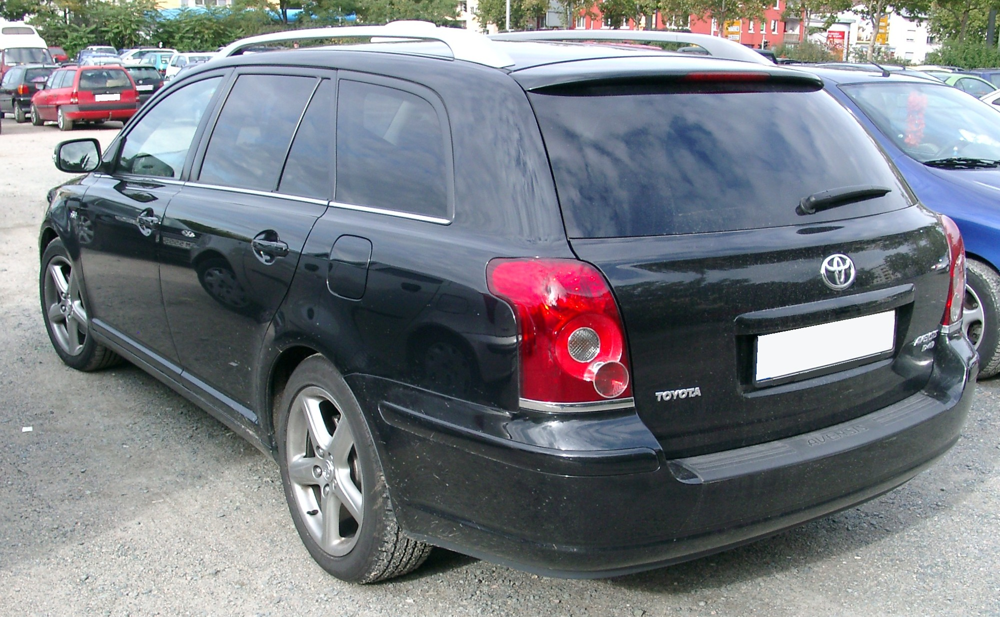 Toyota Avensis Kombi